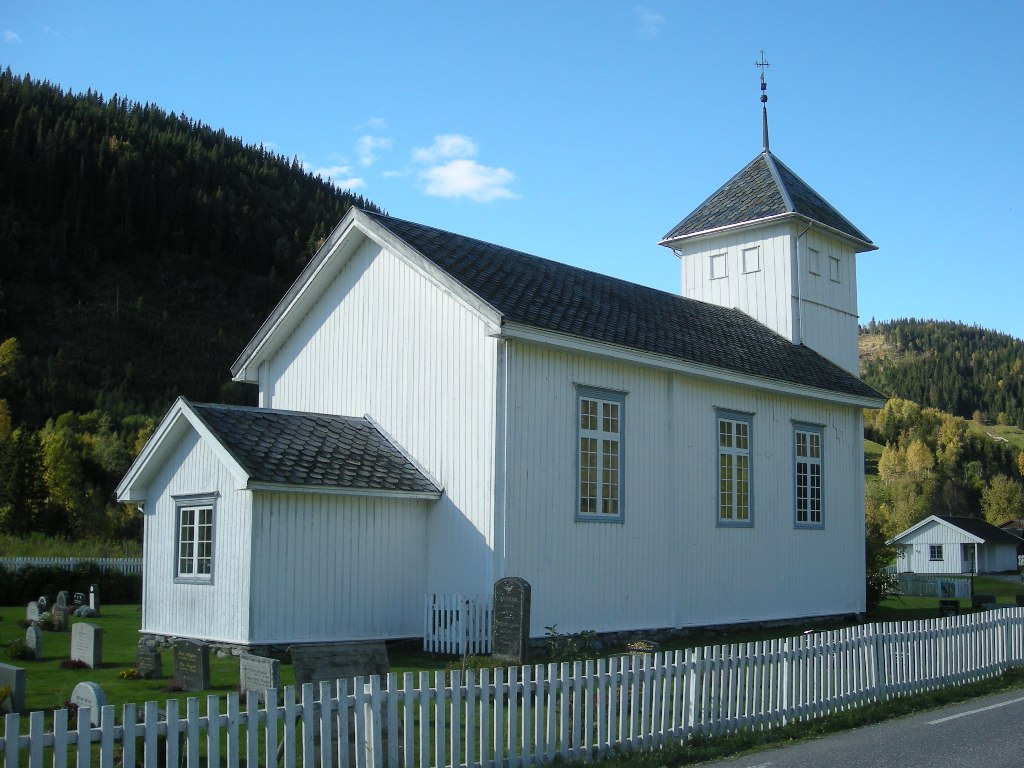 Aulstad kirke, Vestre Gausdal